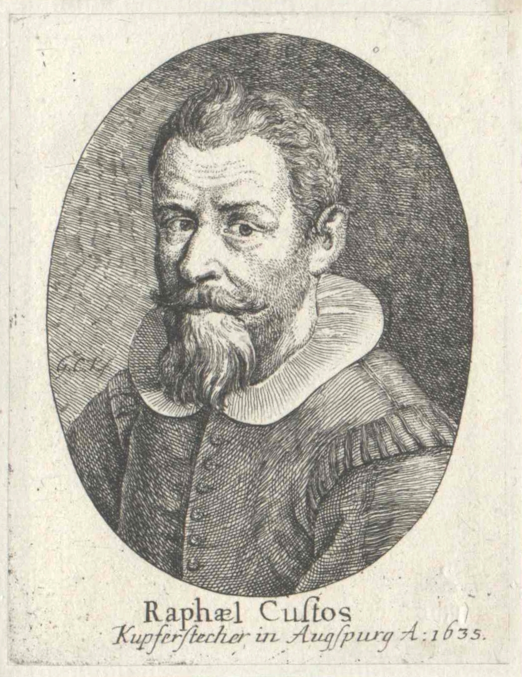 Ein Porträt (Stich) aus dem Jahr 1635 von Raphael Custos (1591–1664), deutscher Kupferstecher, Radierer und Verleger.